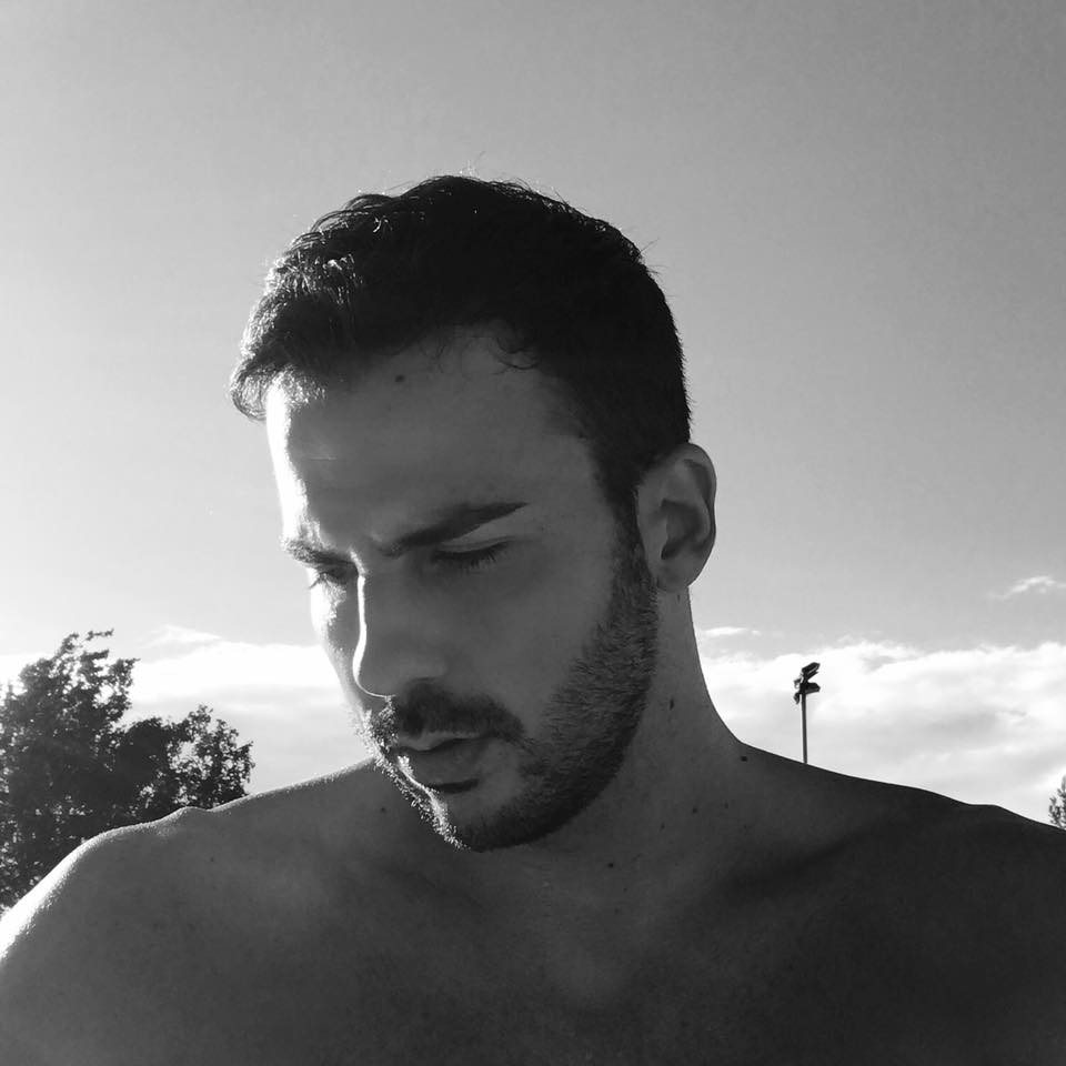 Federico Bocchia